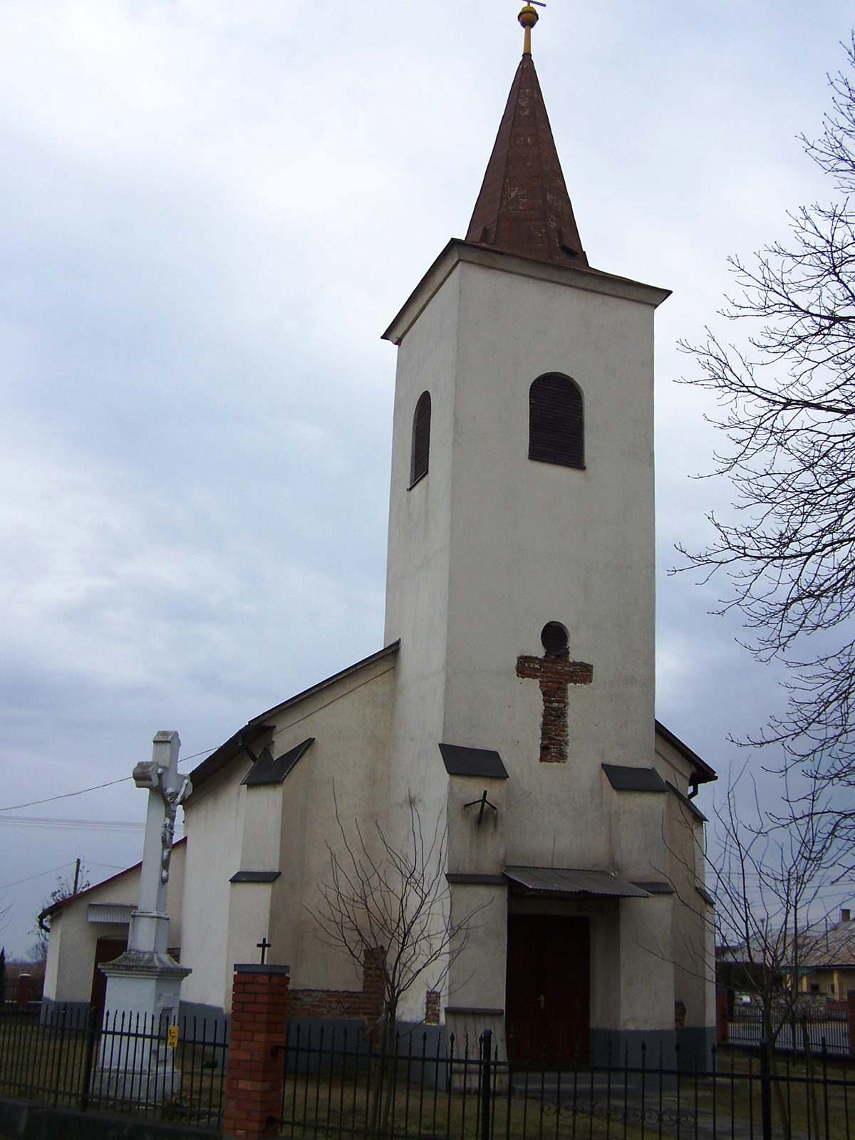 Római katolikus templom (Máriapócs, Kossuth tér) This is a photo of a monument in Hungary. Identifier: 8298